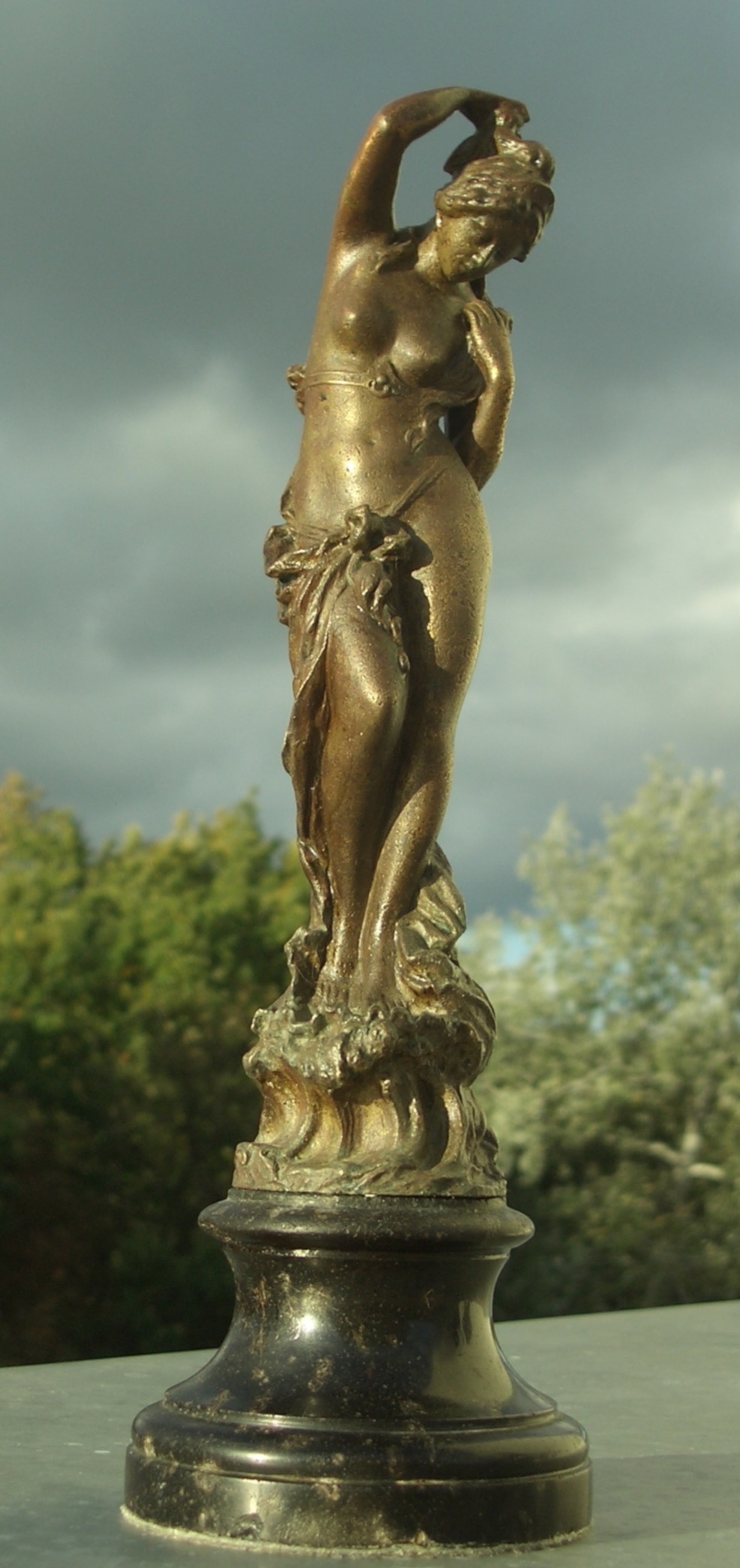 Kleinplastik von Paul Aichele aus dem Jahre 1891. Bronze auf Marmorsockel, ca. 26 cm hoch, signiert. Darstellung einer Nymphe.